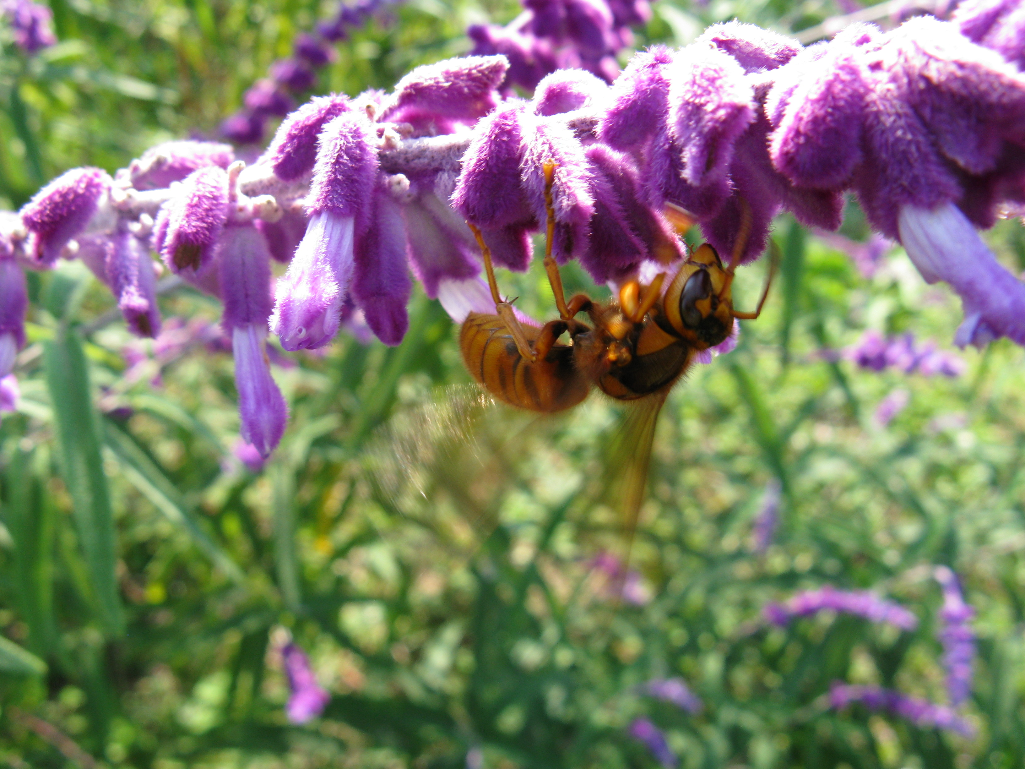 Scientific name Vespa simillima xanthoptera Place:Osaka,Japan